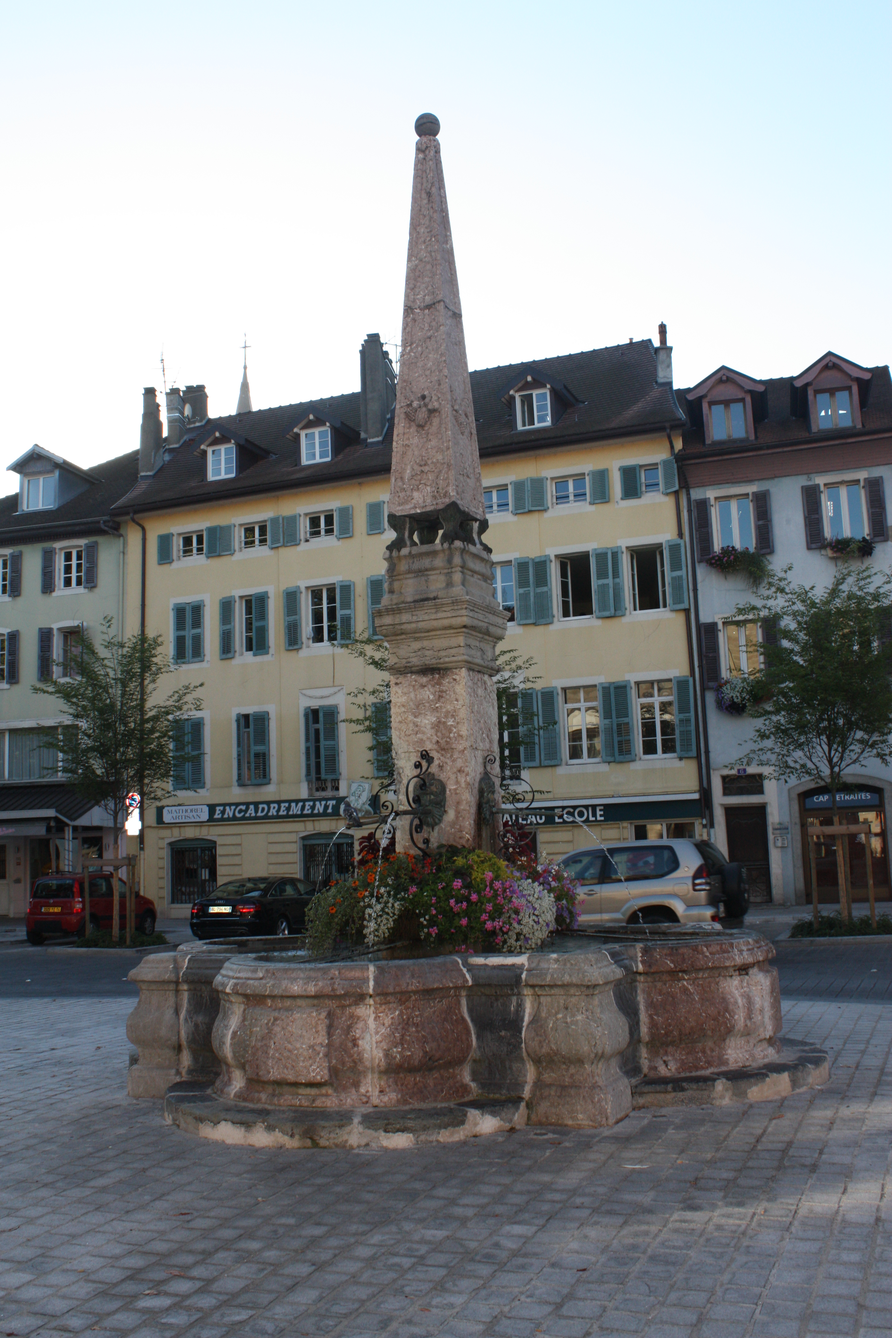 Fontaine de Thonon-les-Bains (Classement)